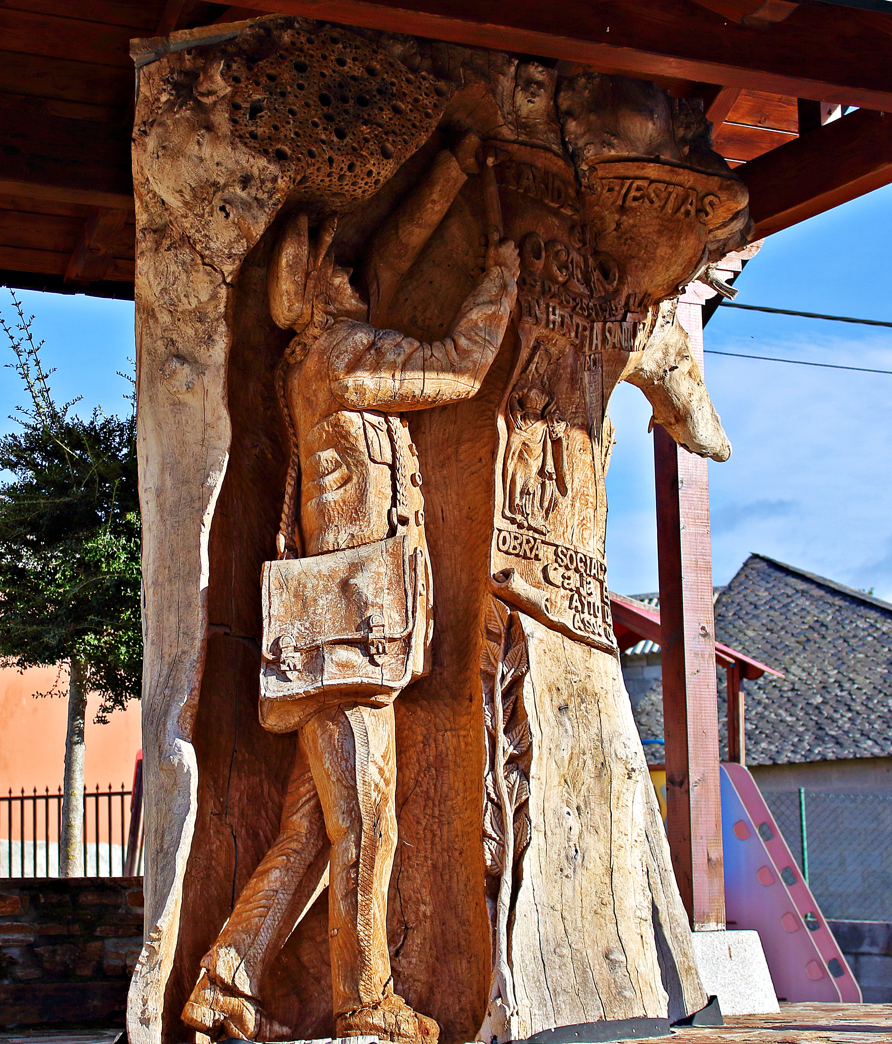 Ocero, localidad de Sancedo, comarca de El Bierzo, provincia de León.